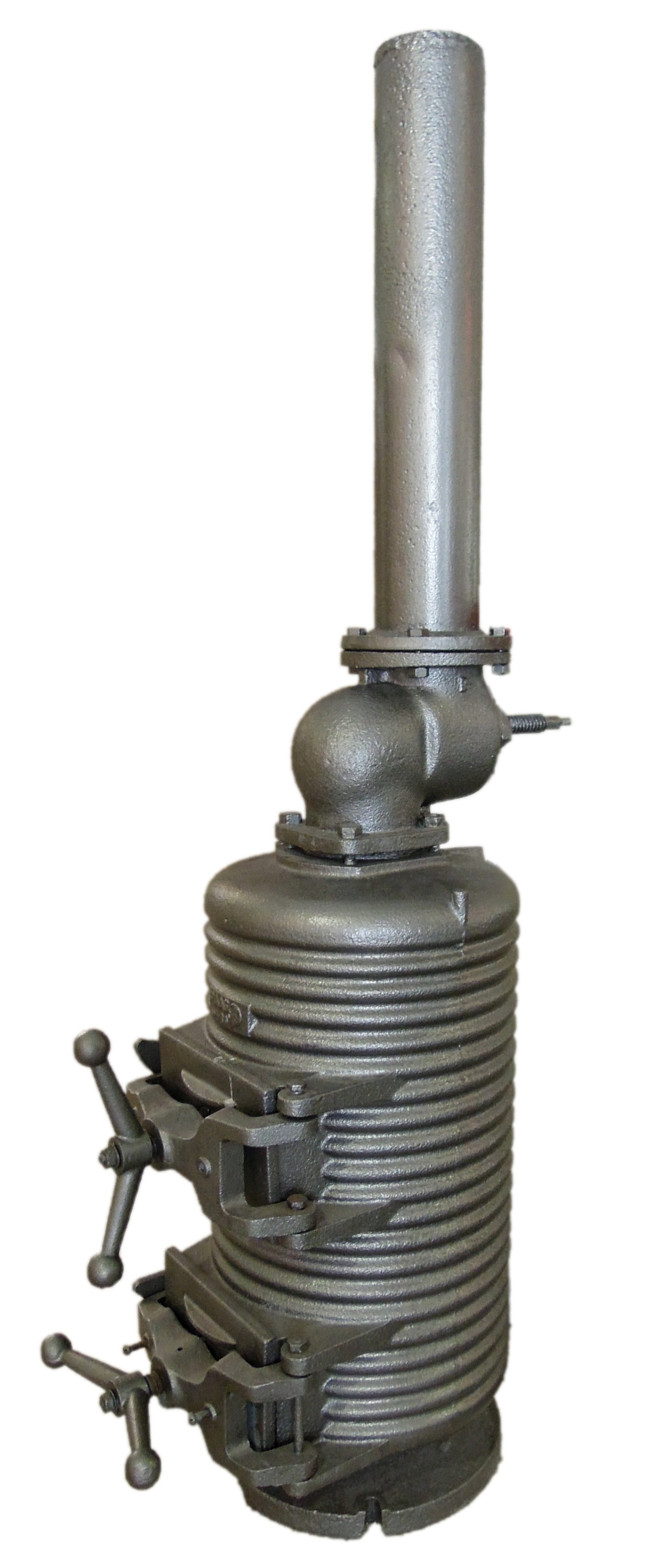 In Westwallbunkern verwendeter Ofentyp